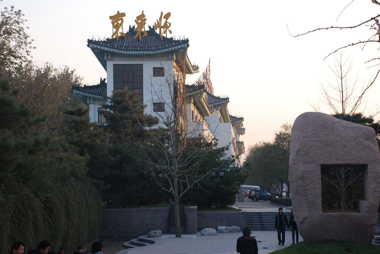 中文（中国大陆）: 南河沿大街东侧的皇城根遗址公园南端。后面是东来顺饭庄华龙街店